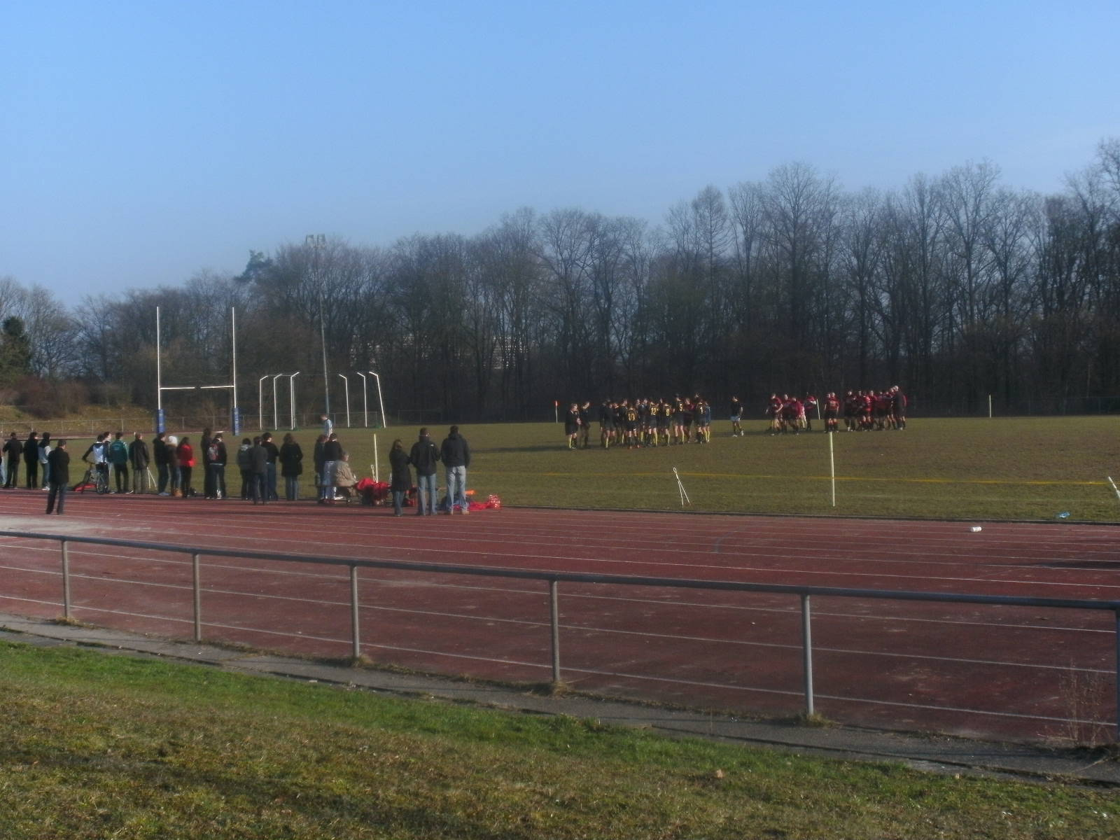 "Hohe Eiche" am Bopser, Sportplatz des Stuttgarter RC, bei einem Ligapsiel gegen SC Frankfurt 1880 II